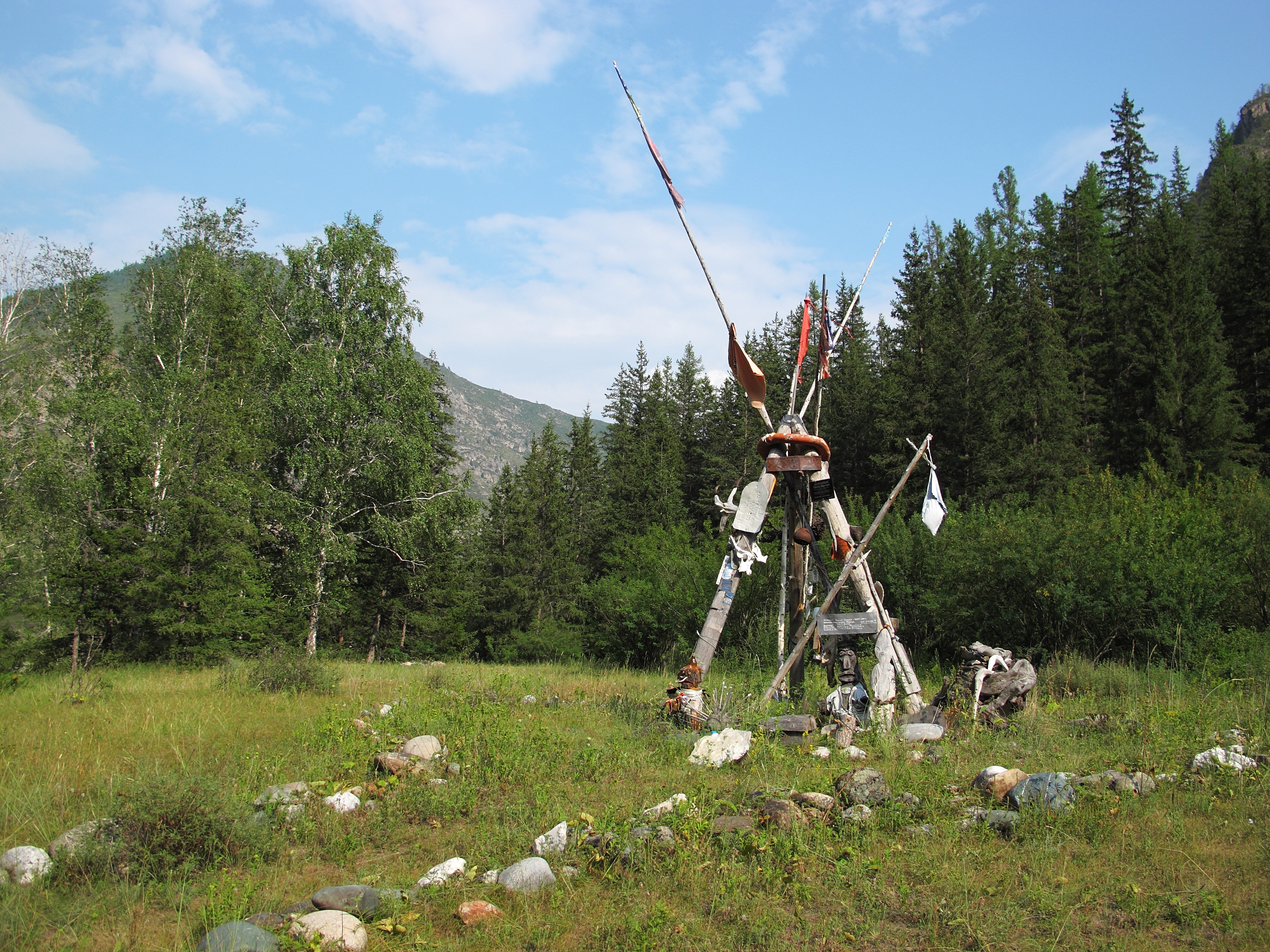 Импровизированный "музей" под открытым небом в устье Аргута созданный и пополняемый туристами-водниками.